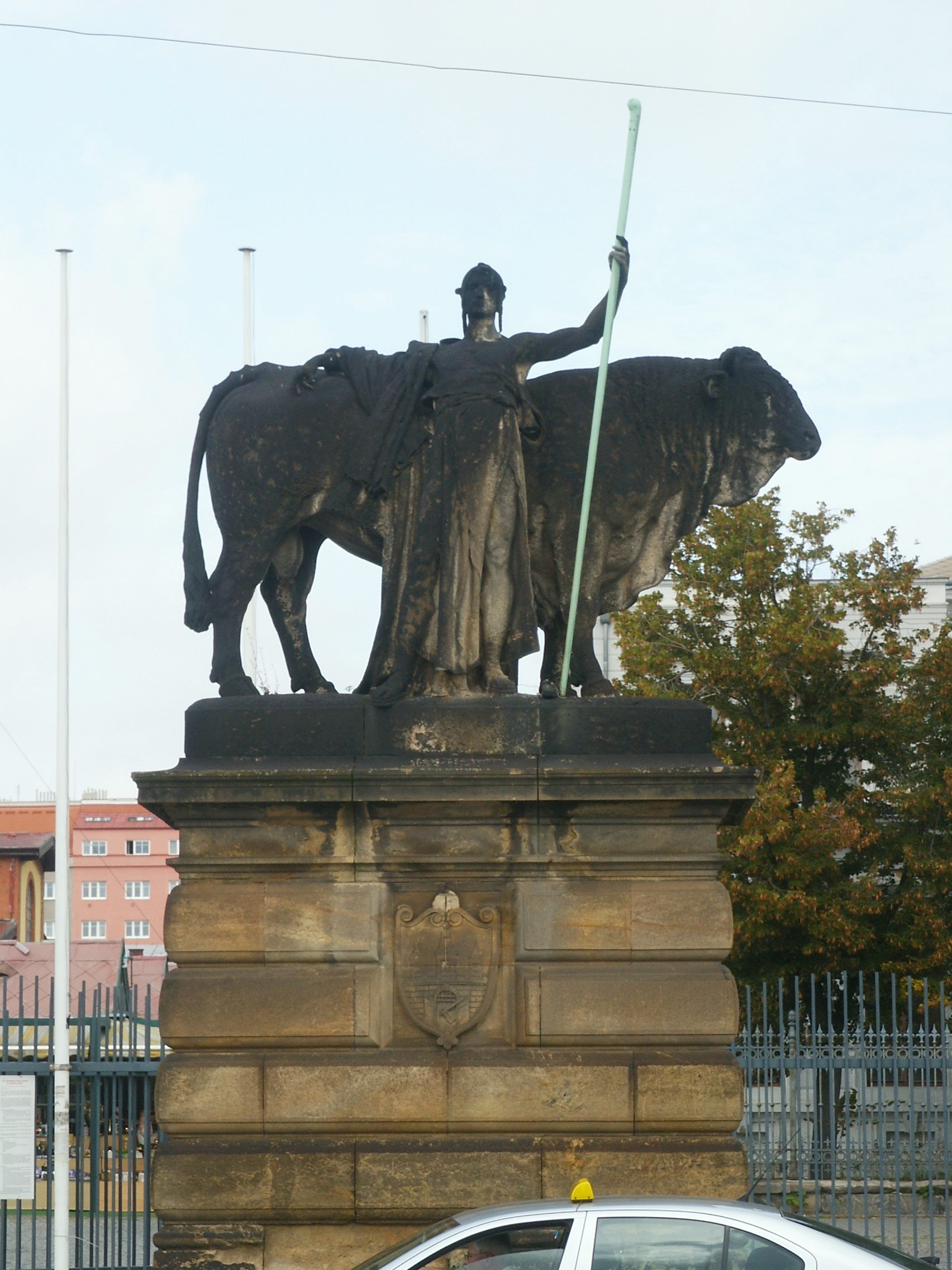 Pražská tržnice (Holešovická jatka), Praha 7-Holešovice, Bubenské nábřeží 306/13, Jateční 306/2, Argentinská 306/2, Komunardů 306/1 - socha před vchodem